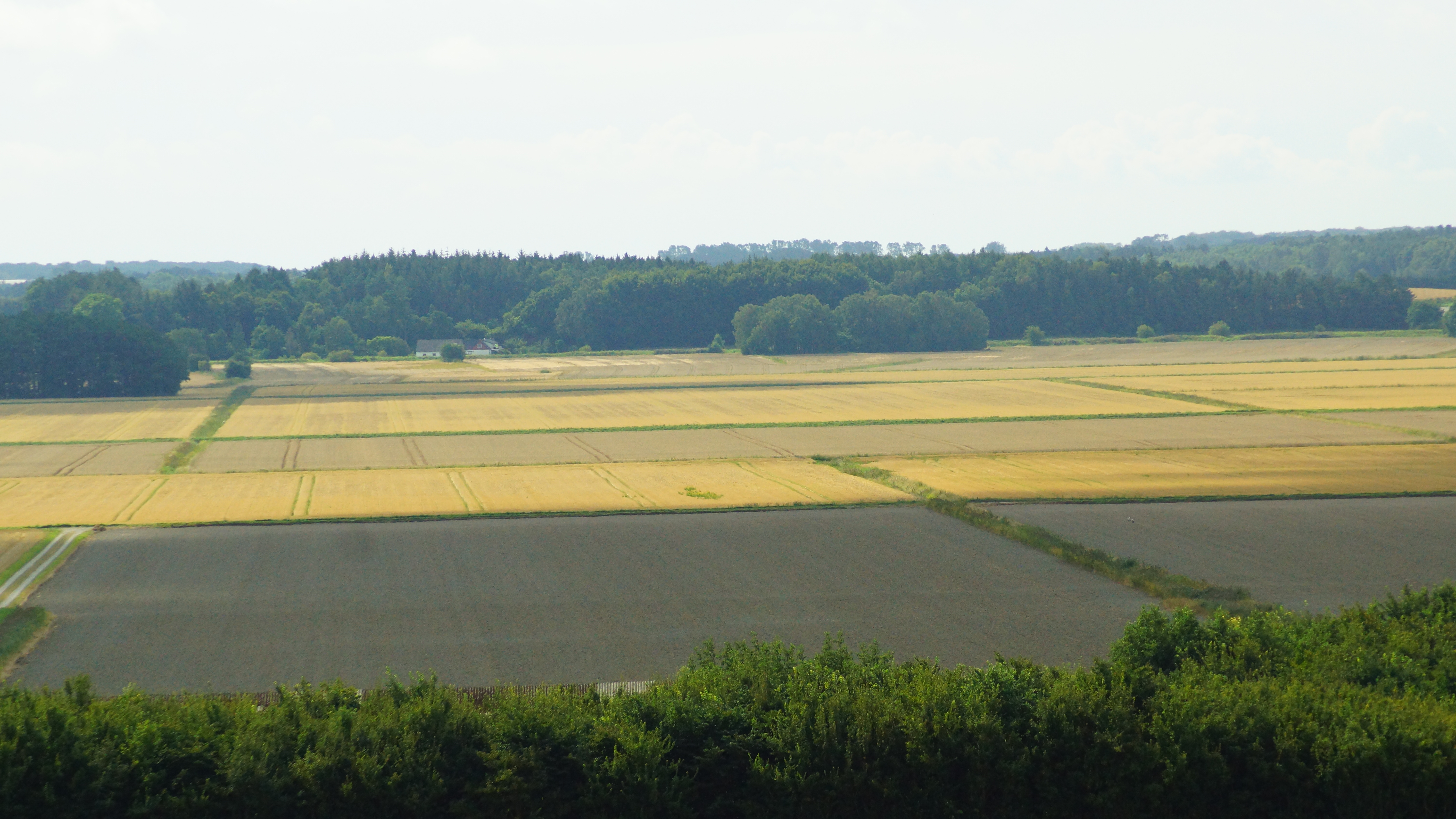 Kolindsund set fra randbakker ved Skiffard